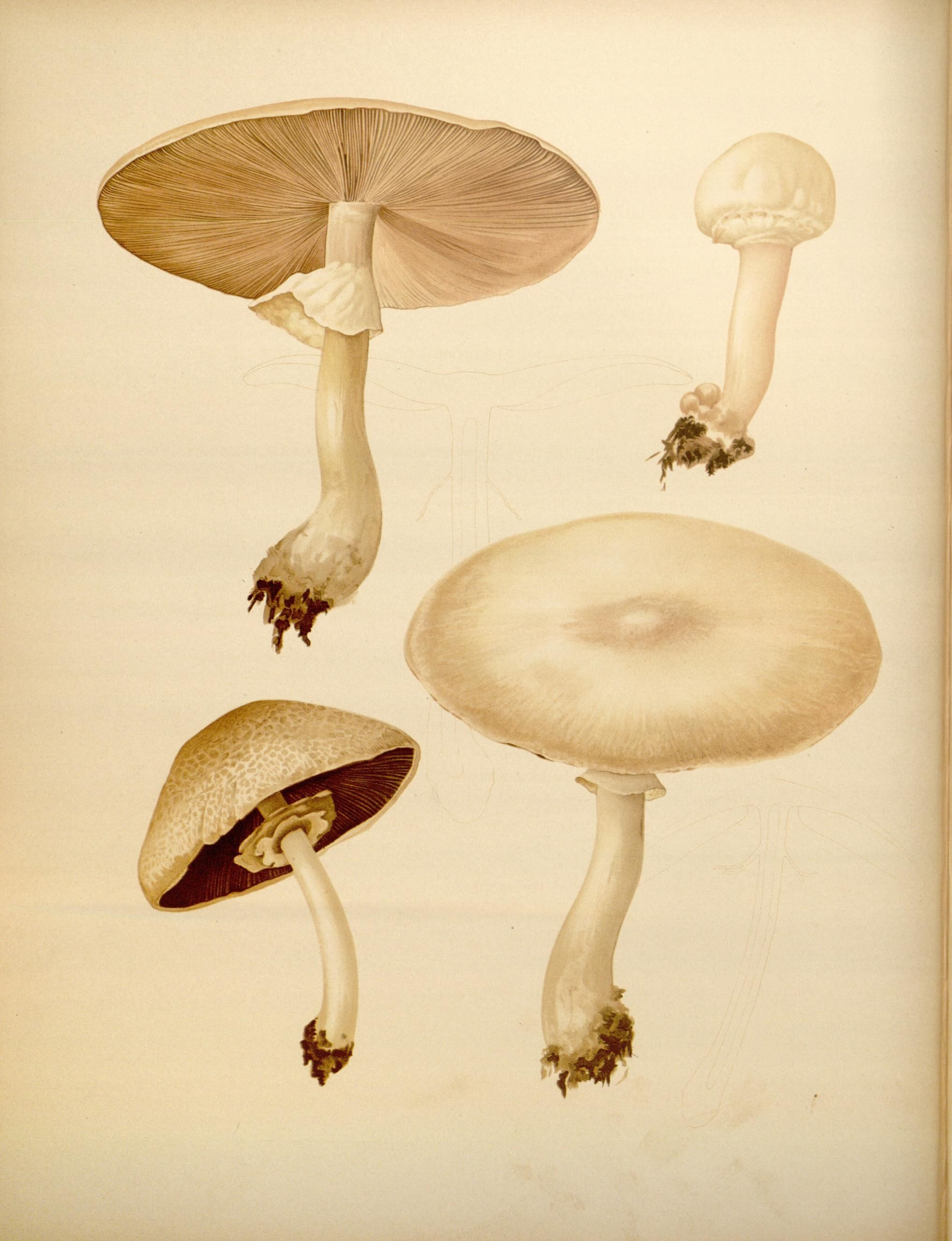 . V *#